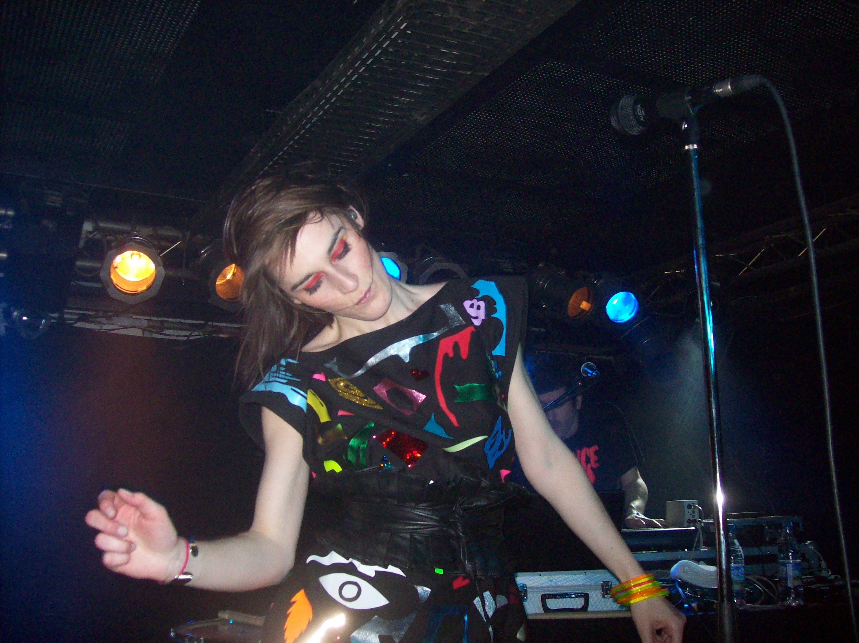 Yelle (Julie Budet bei einem Konzert in Dortmund)